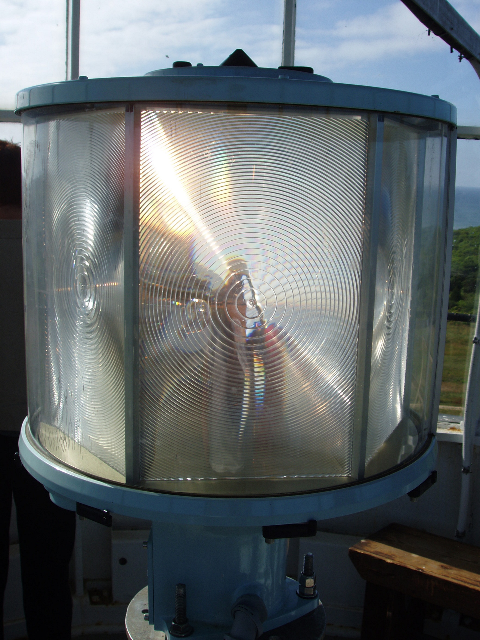 Leuchtfeuer des Highland Light, North Truro, Cape Cod, MA